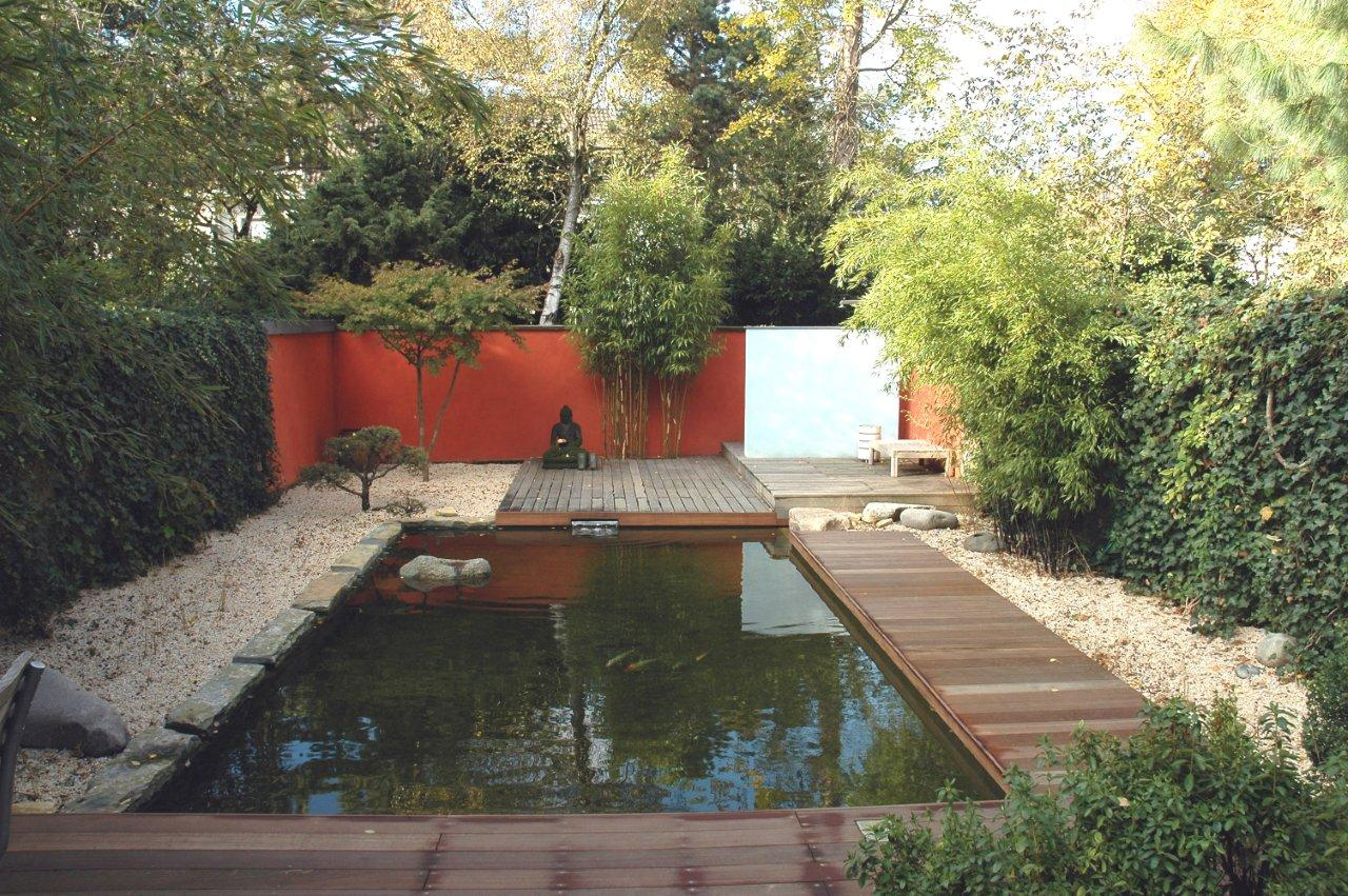 Zbiornik typu "naturpool" bez roslin